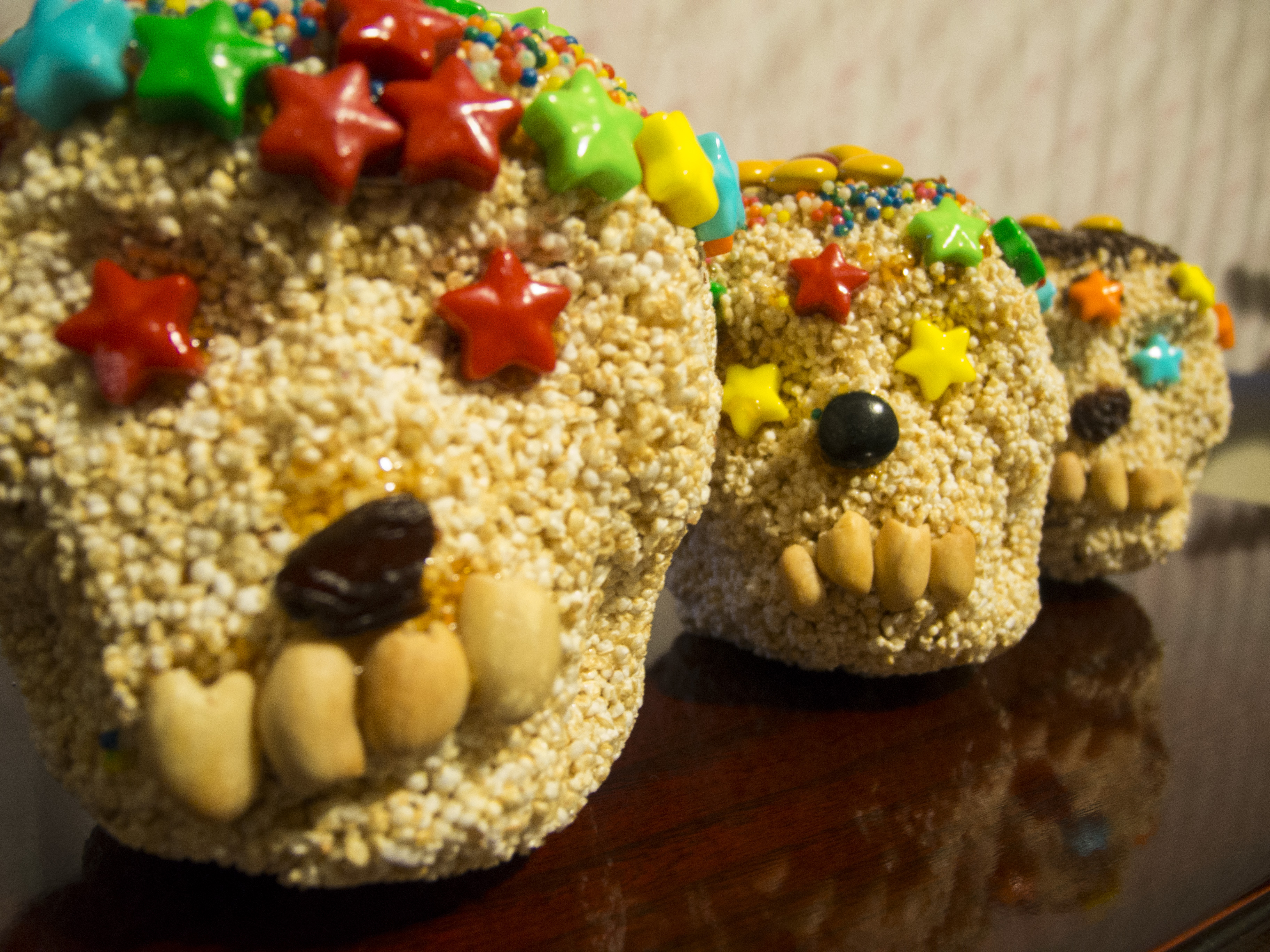 Ofrenda dulce de amaranto.